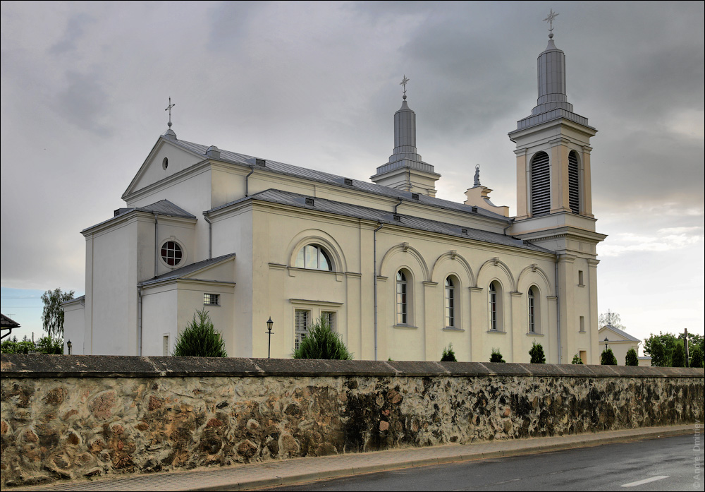 Касцёл Святога Вацлава з боку апсіды. Ваўкавыск